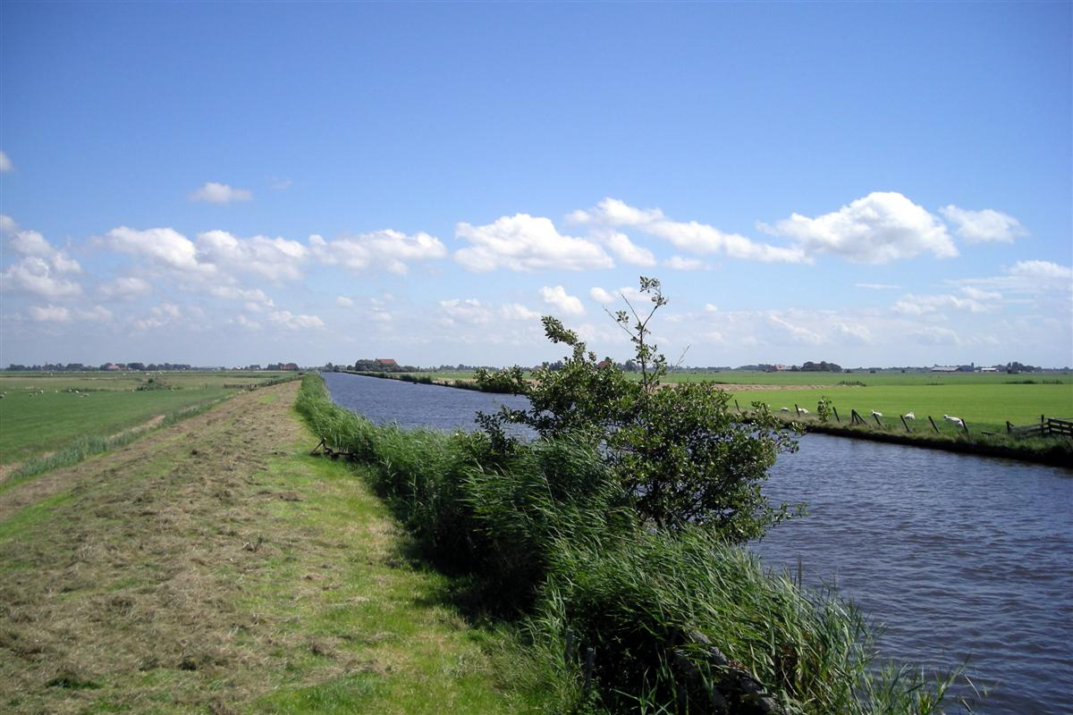 Van Panhuyskanaal, foto in oostelijke richting bij brug tussen Allingawier en Exmorra